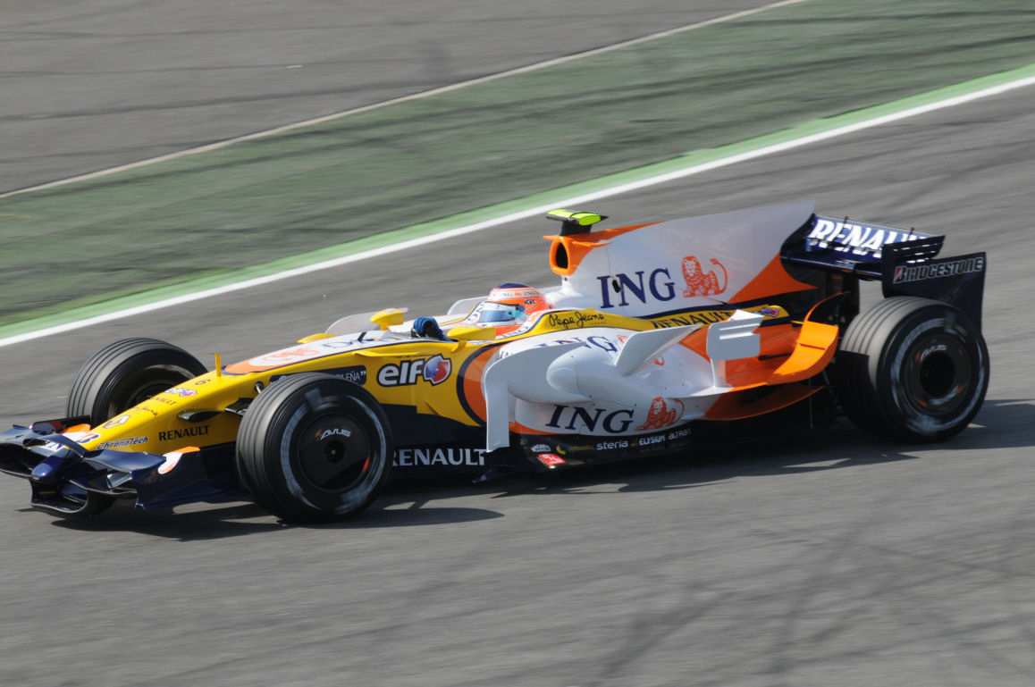 Nelson Piquet Jr. während des Trainings zum GP Spanien 2008